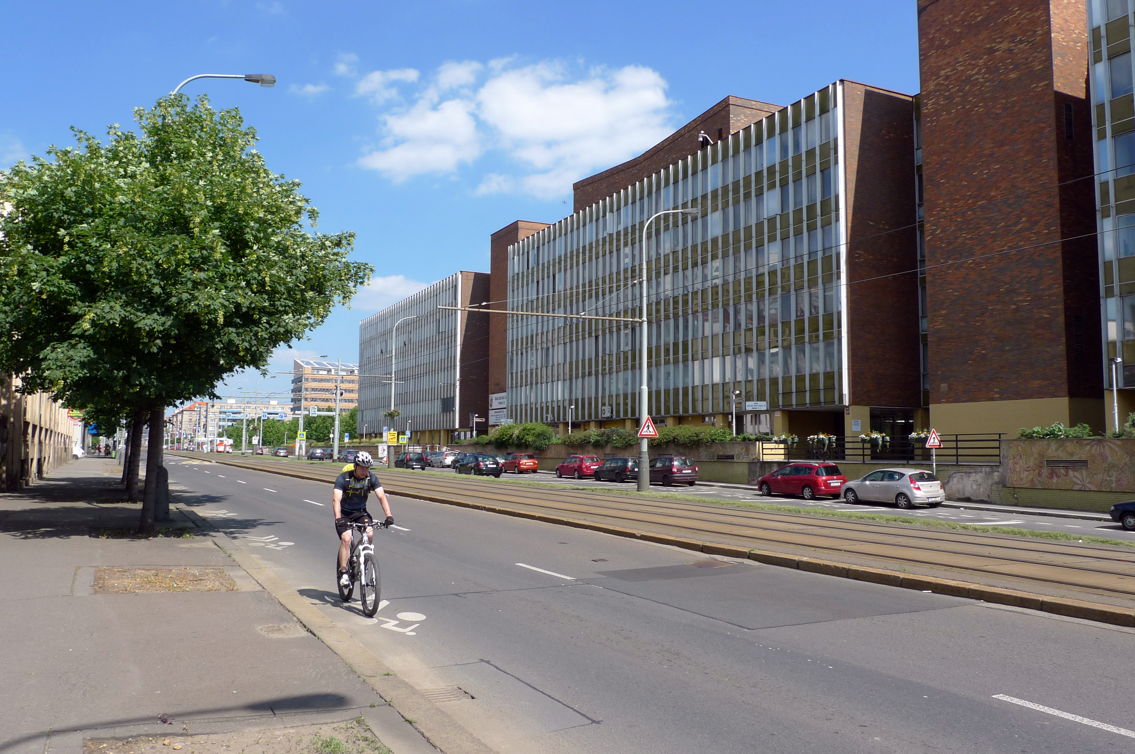 Budova Radnice Prahy 10 na Sídlišti Vlasta ve Vršovické ulici.